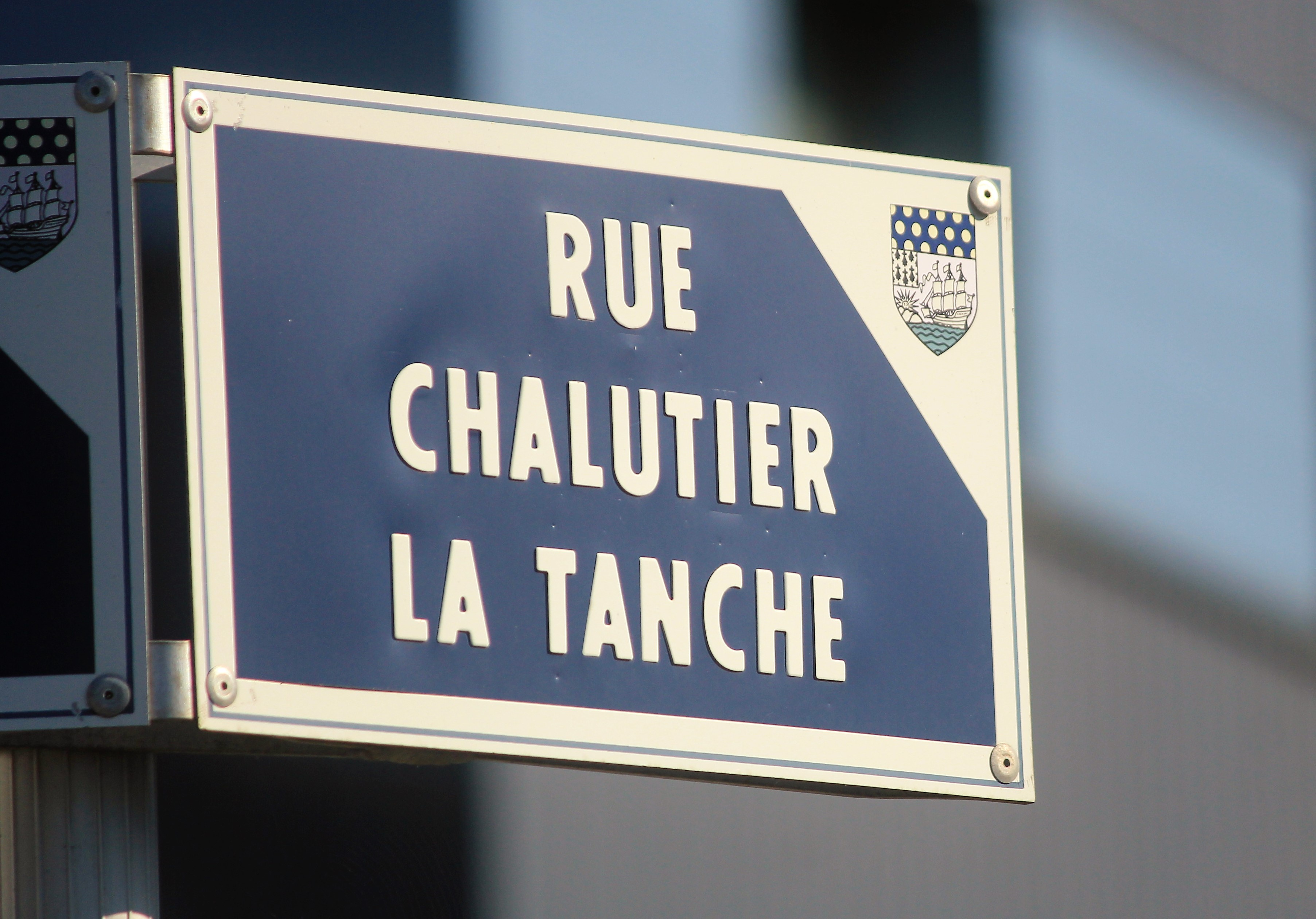 plaque de la rue Chalutier La Tanche à Lorient